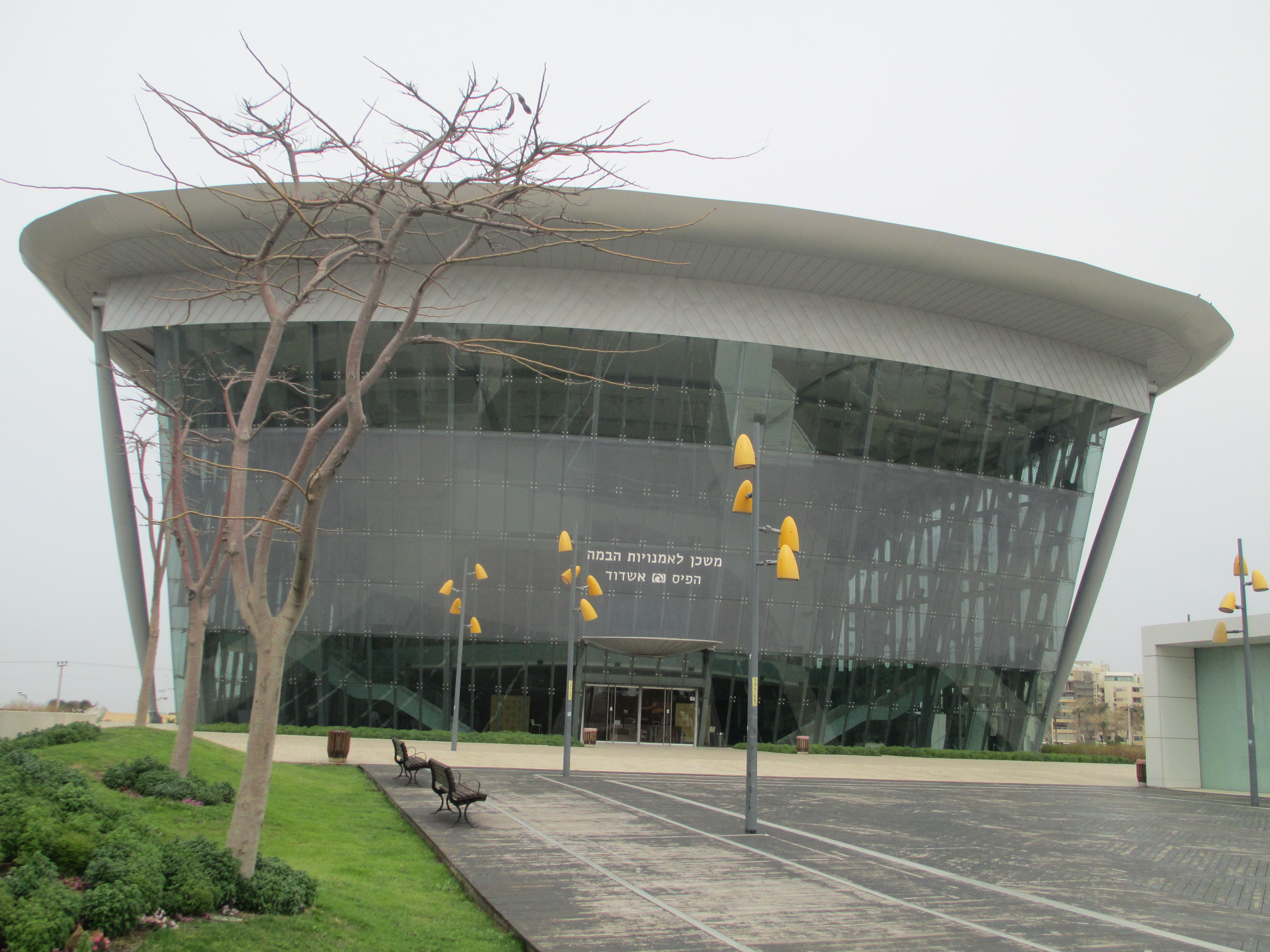 המרכז לאמנויות הבמה באשדוד